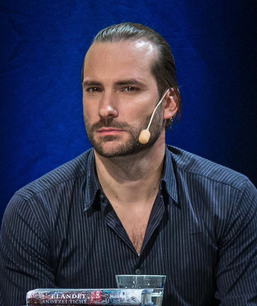 Andrzej Tichý, en av de nominerade till Augustpriset för Årets svenska skönlitterära bok 2016. På Kulturhuset Stadsteatern i Stockholm den 24 oktober 2016.